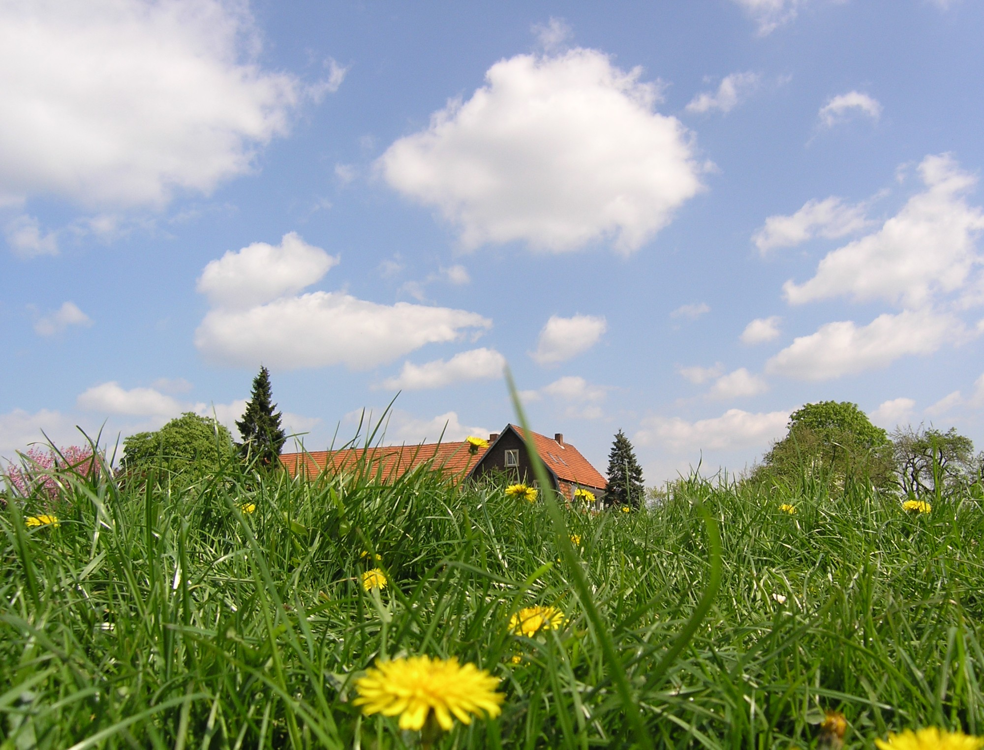 Pasture/Meadow (de: fette Mähweide im Münsterland). Location: Münster, NRW, Germany